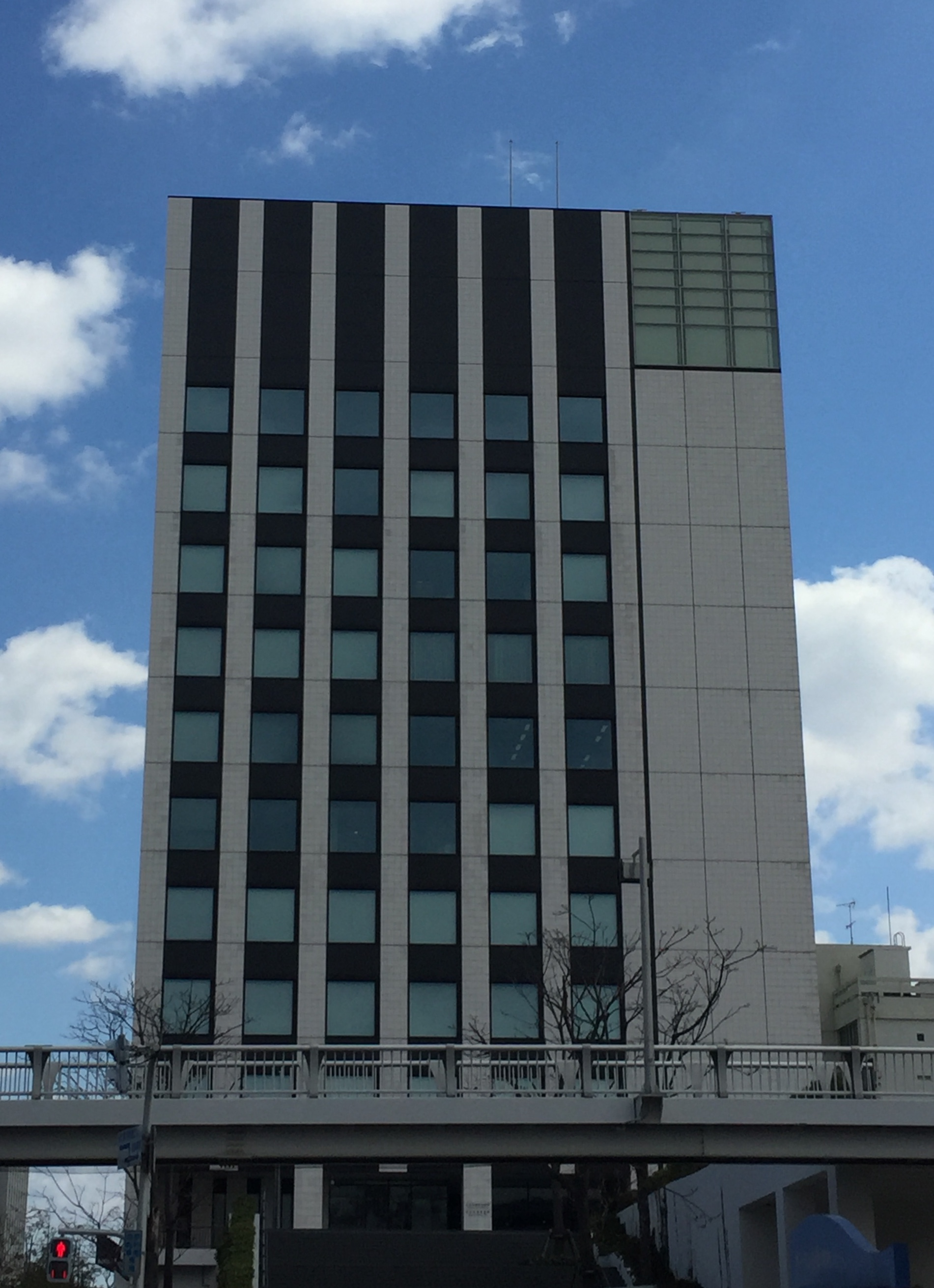 名古屋港管理組合